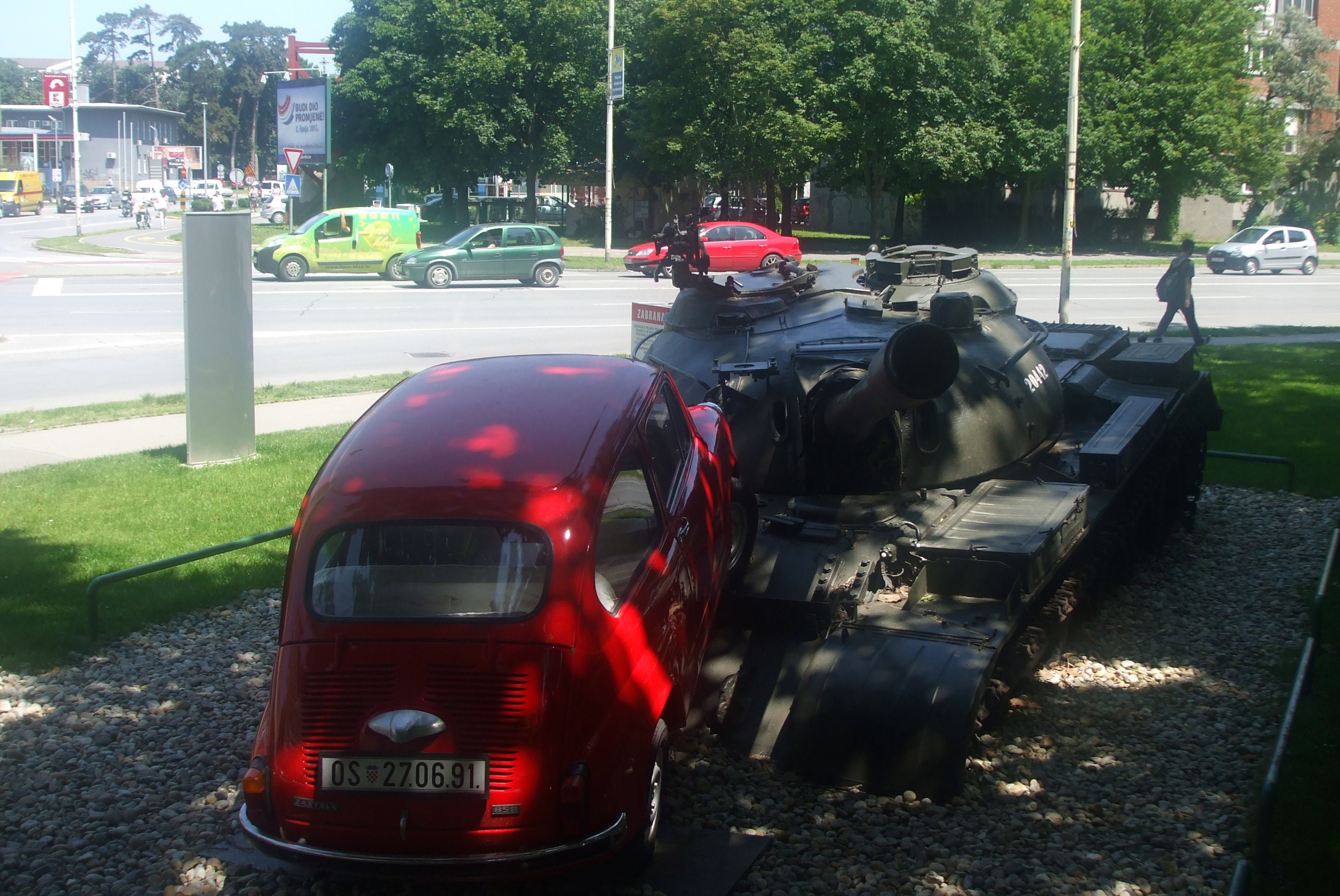 Umjetnička instalacija Crvenog fiće i tenka JNA u Osijeku.